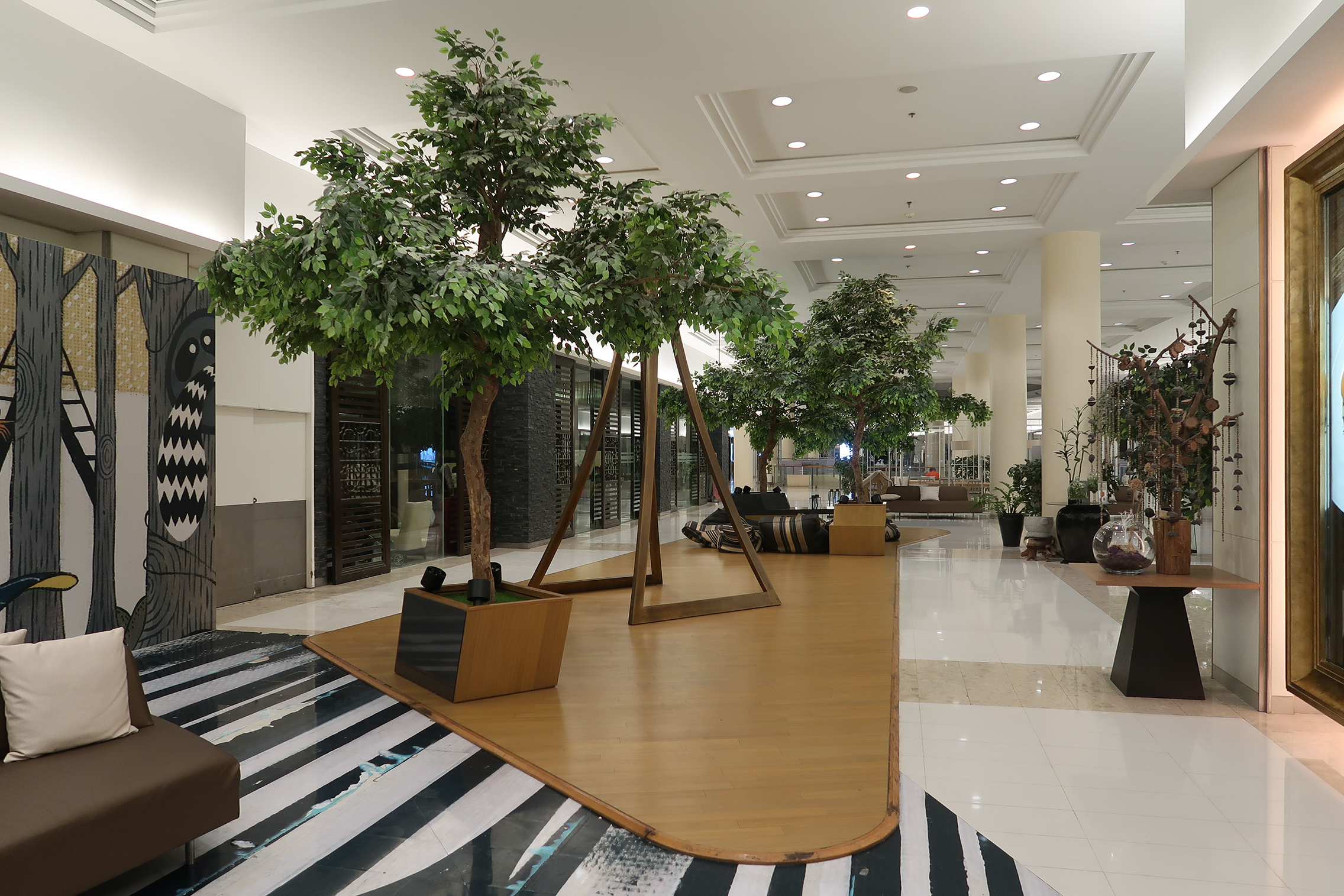 Gaysorn Village Level 4